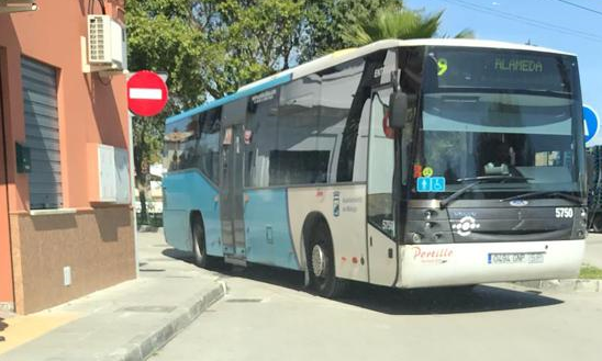 Vehículo de CTSA Portillo con que la EMT opera la L-9.